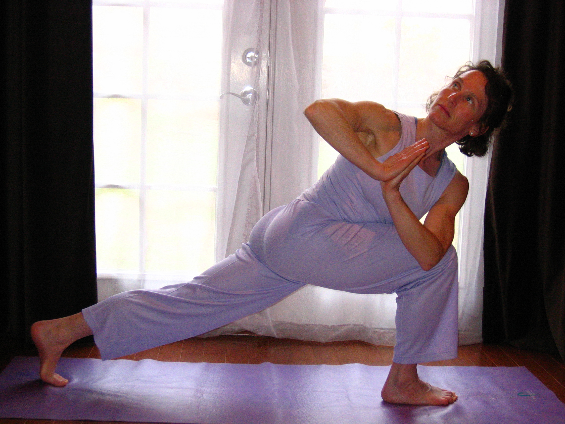 Revolved Lunge or Revolved Side Angle Pose Parivrtta Parsvakonasana